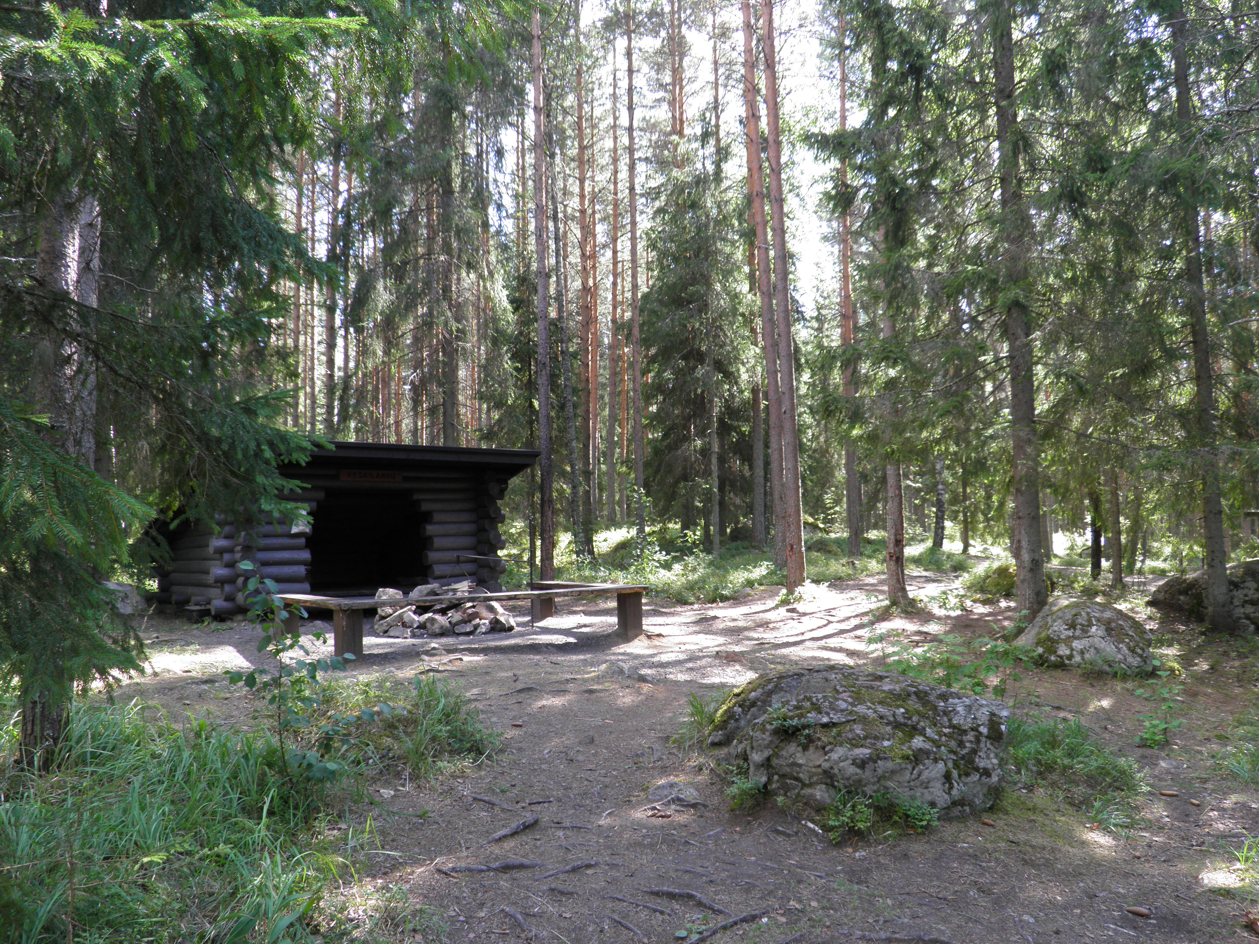 Metsää ja laavu Evon retkeilyalueella Hämeenlinnassa.